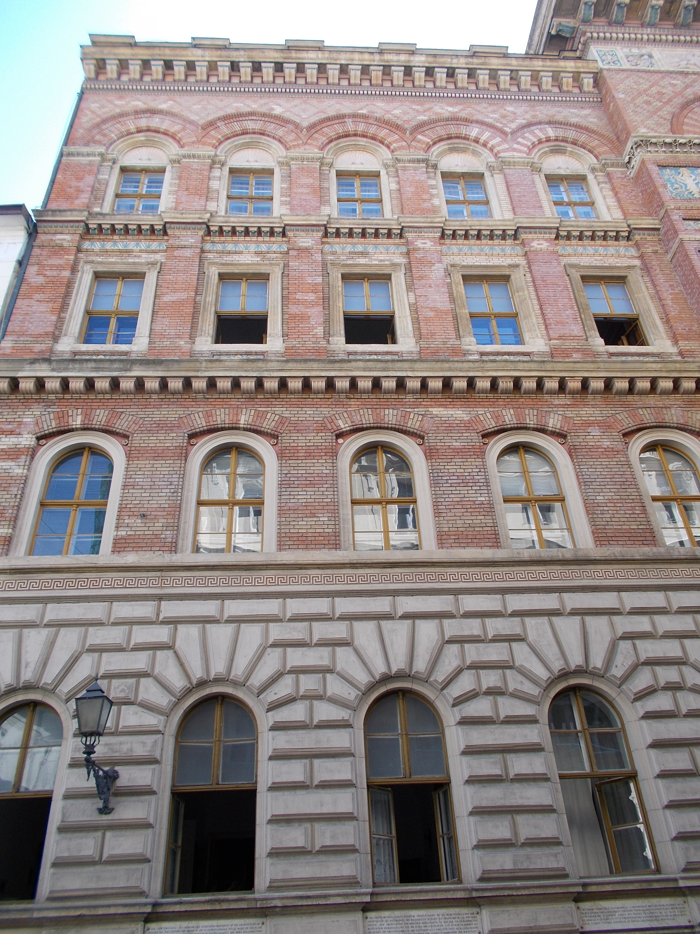 'Újvárosháza.' Homlokzat, északi részlet. Háromemeletes, eklektikus középület. Műemlék ID 646 - Budapest V., Váci utca 62-64. . This is a photo of a monument in Hungary, Identifier: 646